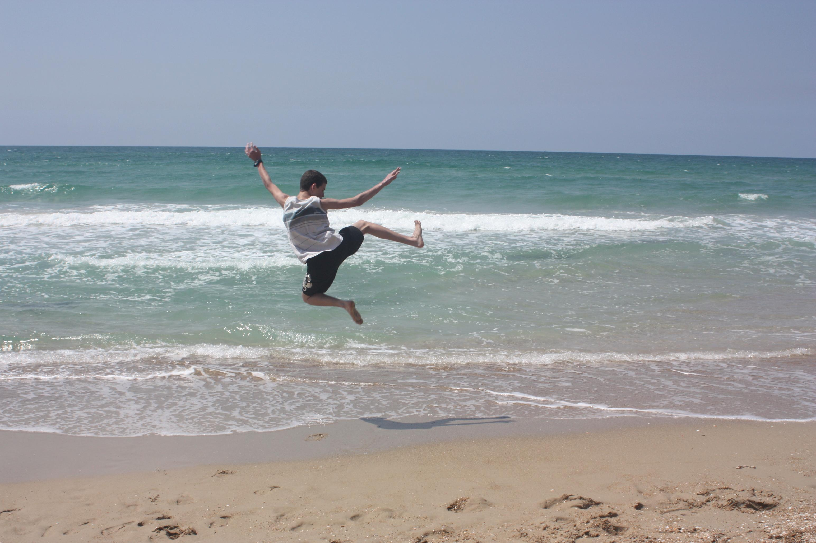 קפיצה באוויר בחוף נעורים ליד נתניה